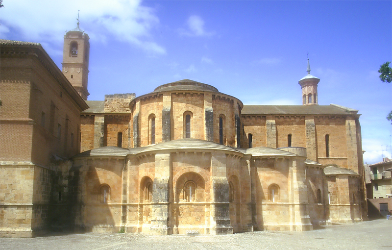 Absides del monasterio de Fitero (Navarra España)